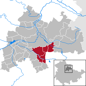 Verwaltungsgemeinschaft An der Marke in Thuringia - District Sömmerda